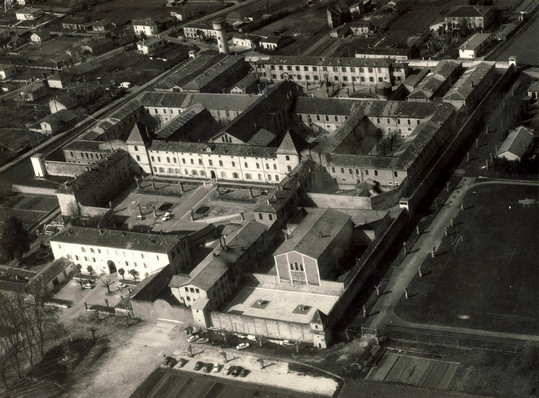 Photo aérienne de la prison d'Eysses à Villeneuve-sur-Lot, où 1400 détenus résistants ont été regroupés par les autorités de Vichy à partir du 15 octobre 1943